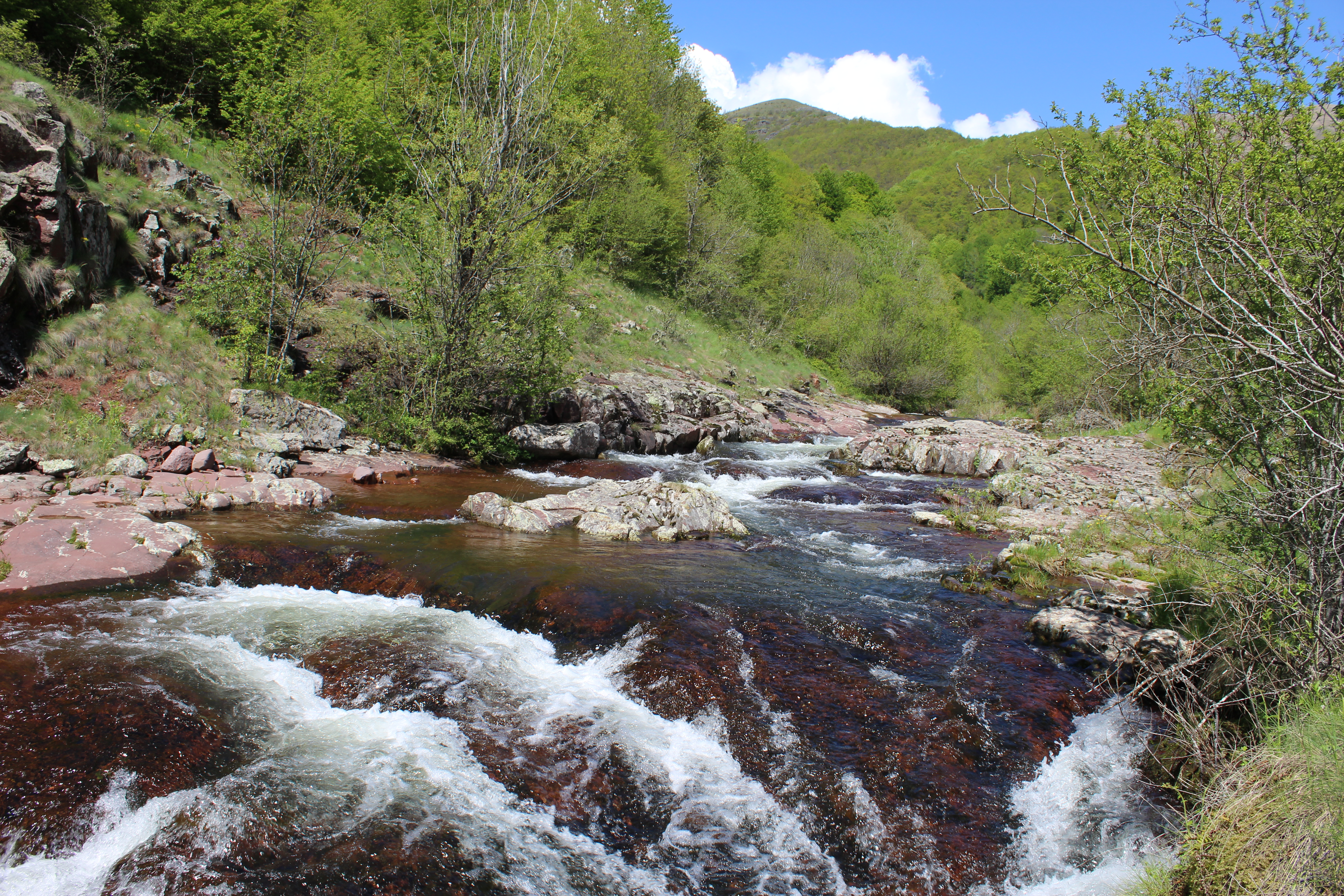 Srpski (latinica): Korito Toplodolske reke.